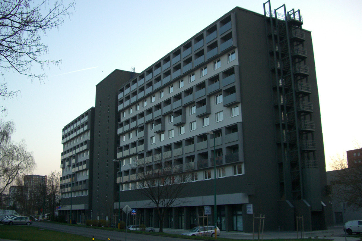 Hotel Bratislava od Jasikovej ulice, Bratislava/Ruzinov/Posen